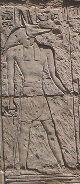 Relief représentant le dieu Anubis - Chapelle du grand prêtre de Ptah Sheshonq, fils d'Osorkon II - XXIIe dynastie égyptienne - Jardin du Musée du Caire